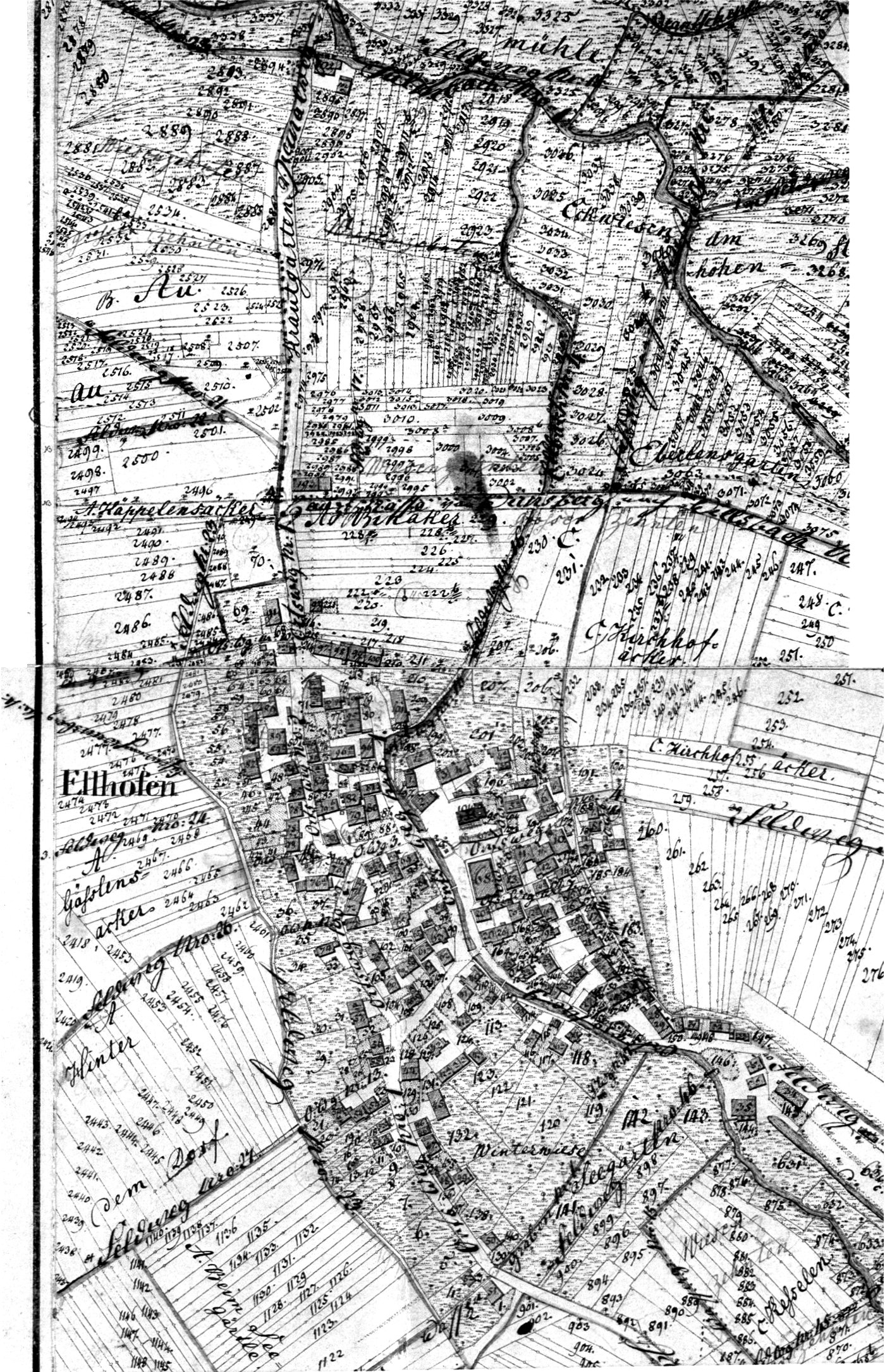 Ortsplan Ellhofen/Württ. von 1833